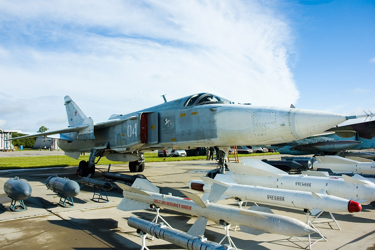 Su-24